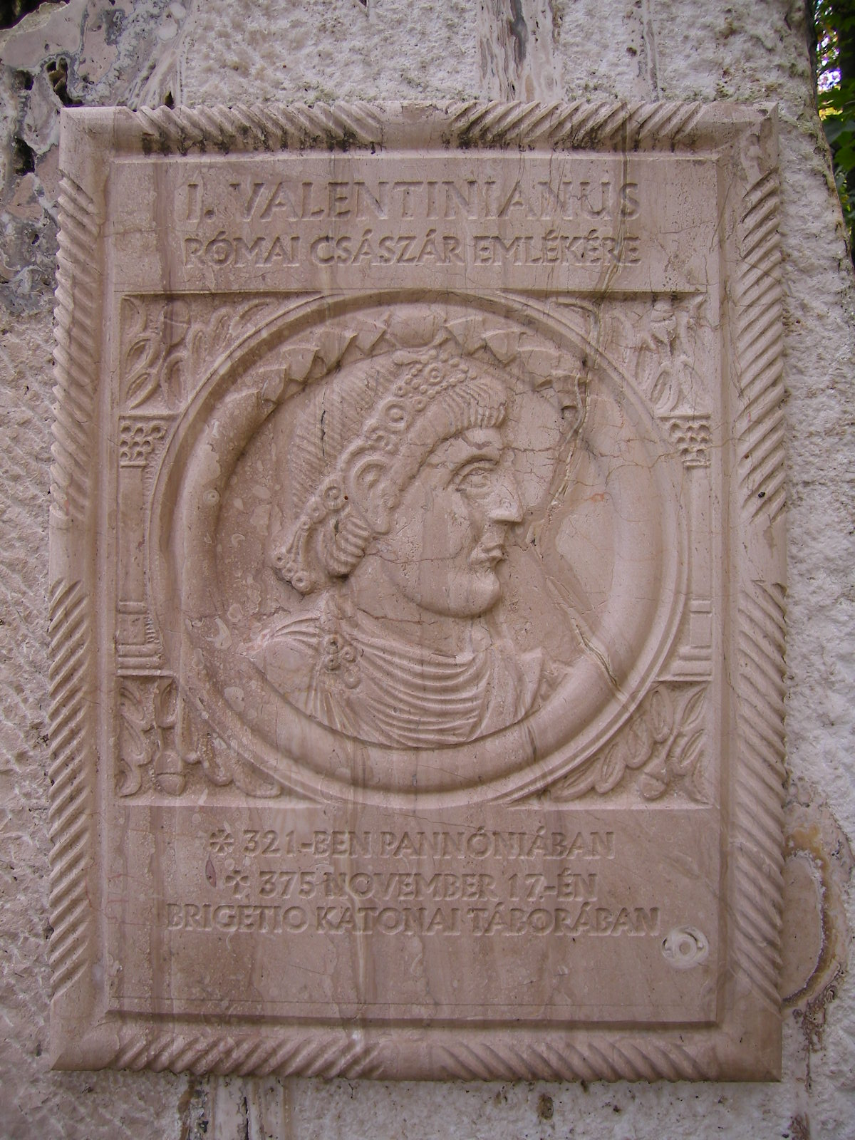 Dél-Komárom - I. Valentinianus császár emlékműve a KKV-lakótelepen